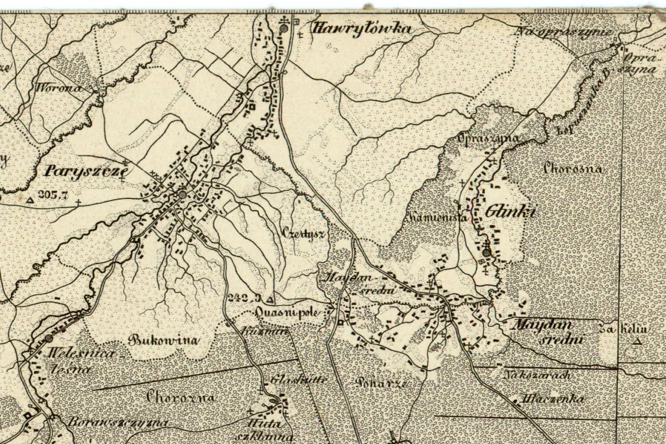 Фрагмент адміністративної карти королівства Галичини і Лодомерії 1855 року, с. Середній Майдан